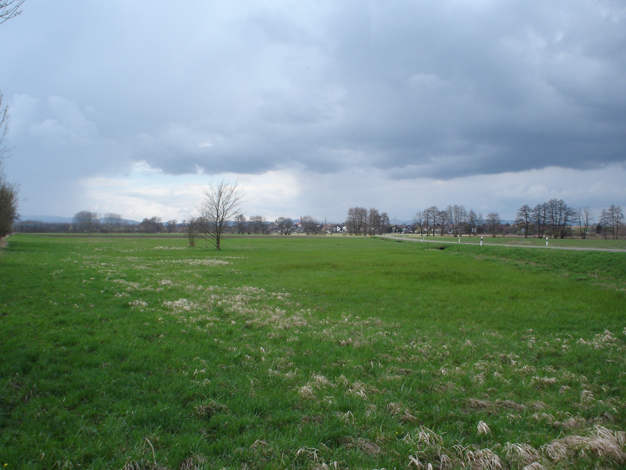 Ansicht von Minfeld Krummer Deich